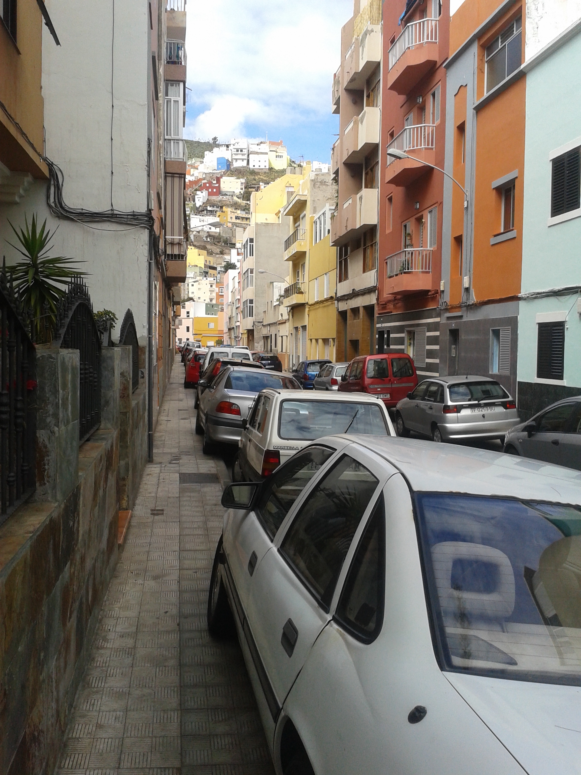 Calle Mencey Ventor en el barrio santacrucero de La Salud